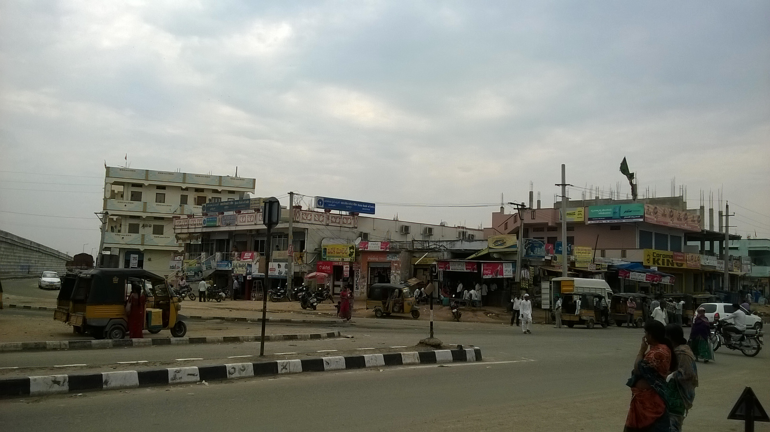 భూత్పూరు చౌరస్తా